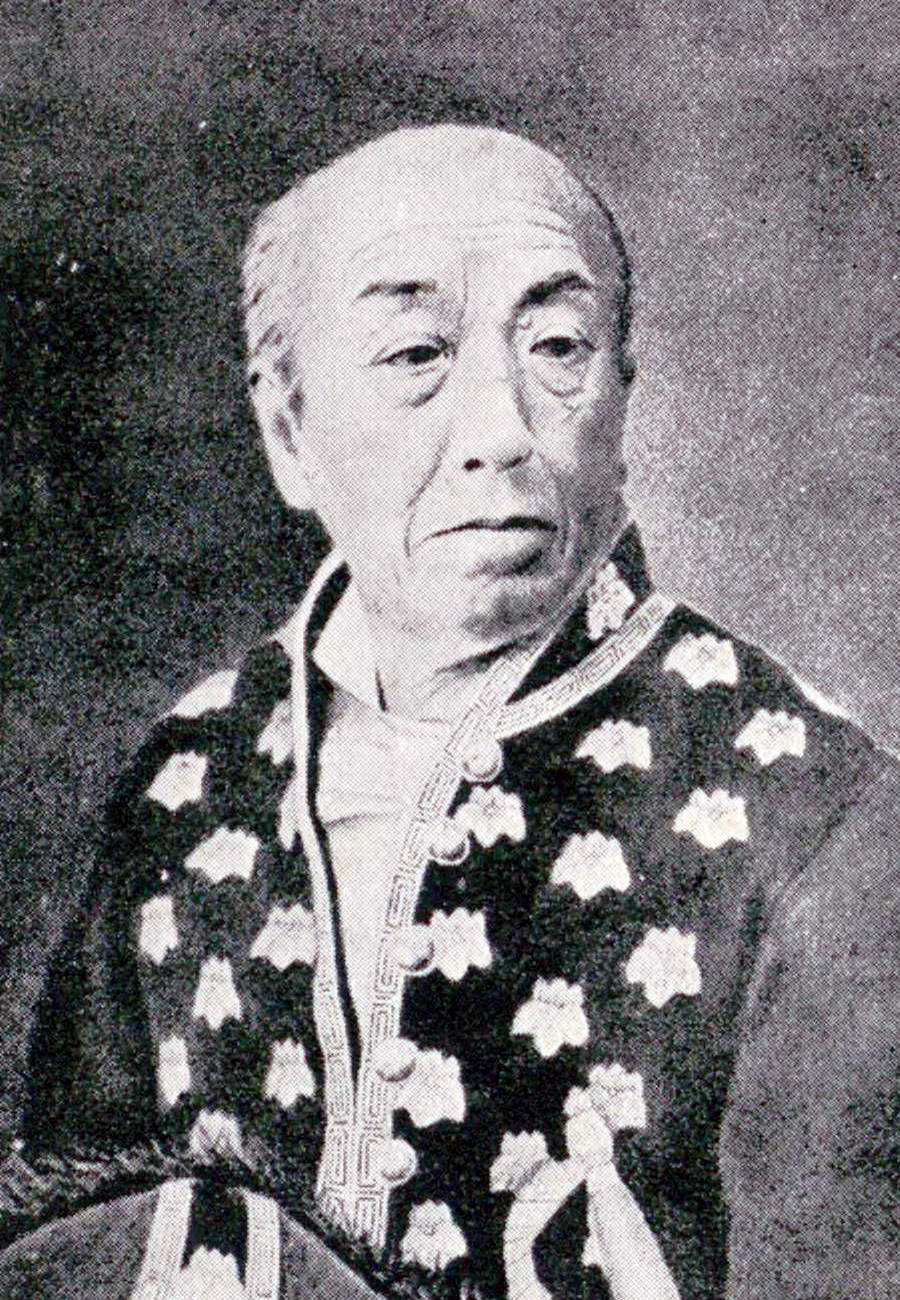 「幕末名家寫眞集2」 上杉斉憲